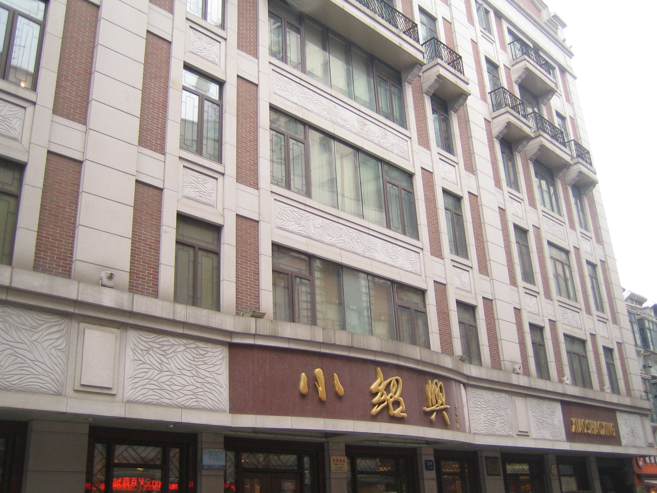 小绍兴酒家店面